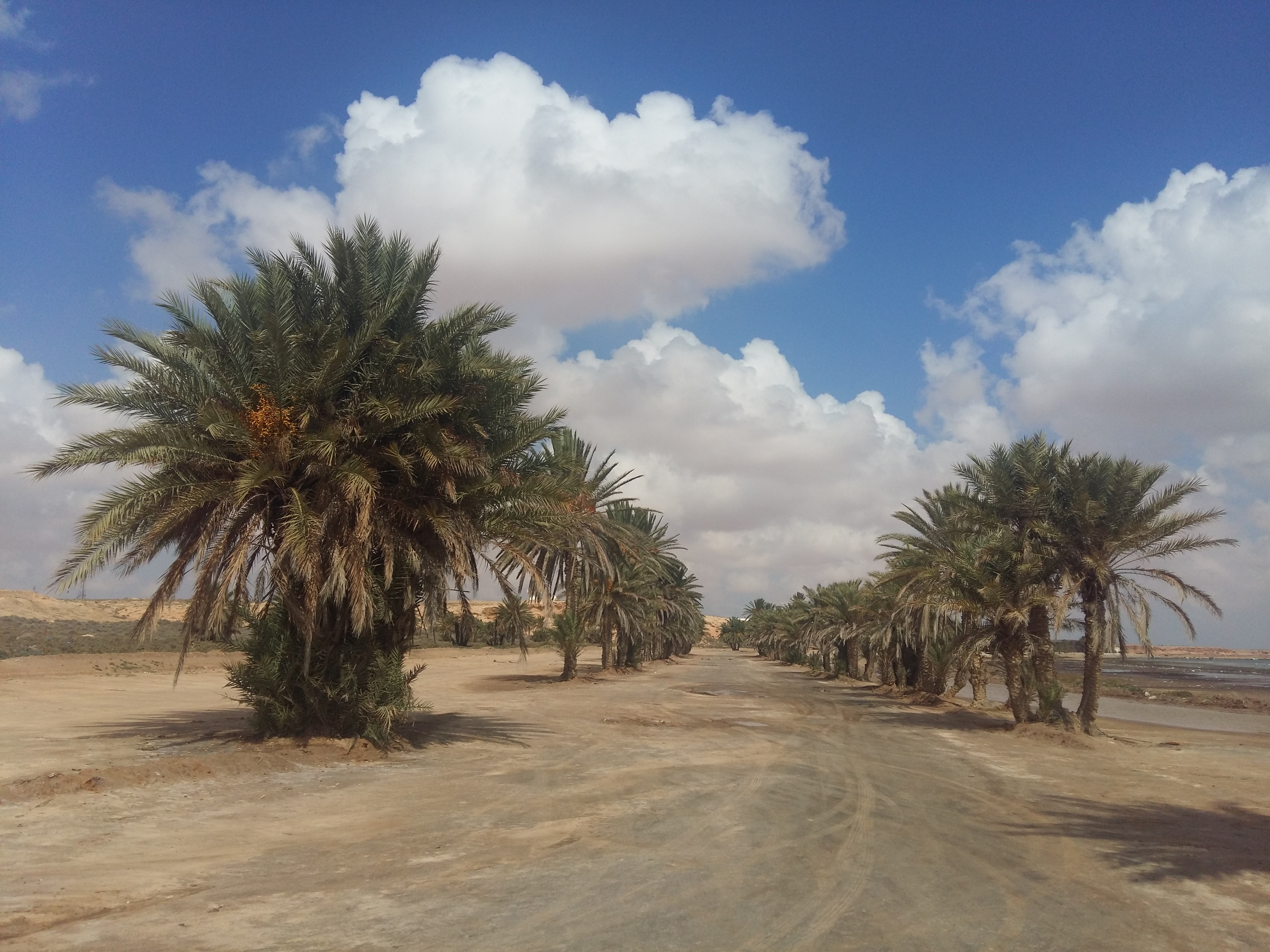 Golfe de Boughrara